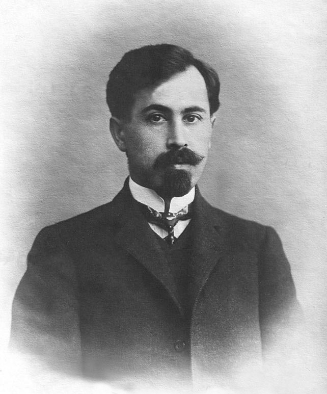 Депутат Третьей Государственной думы от Бакинской, Елизаветпольской и Эриванской губерний Х.Хас - Мамедов.